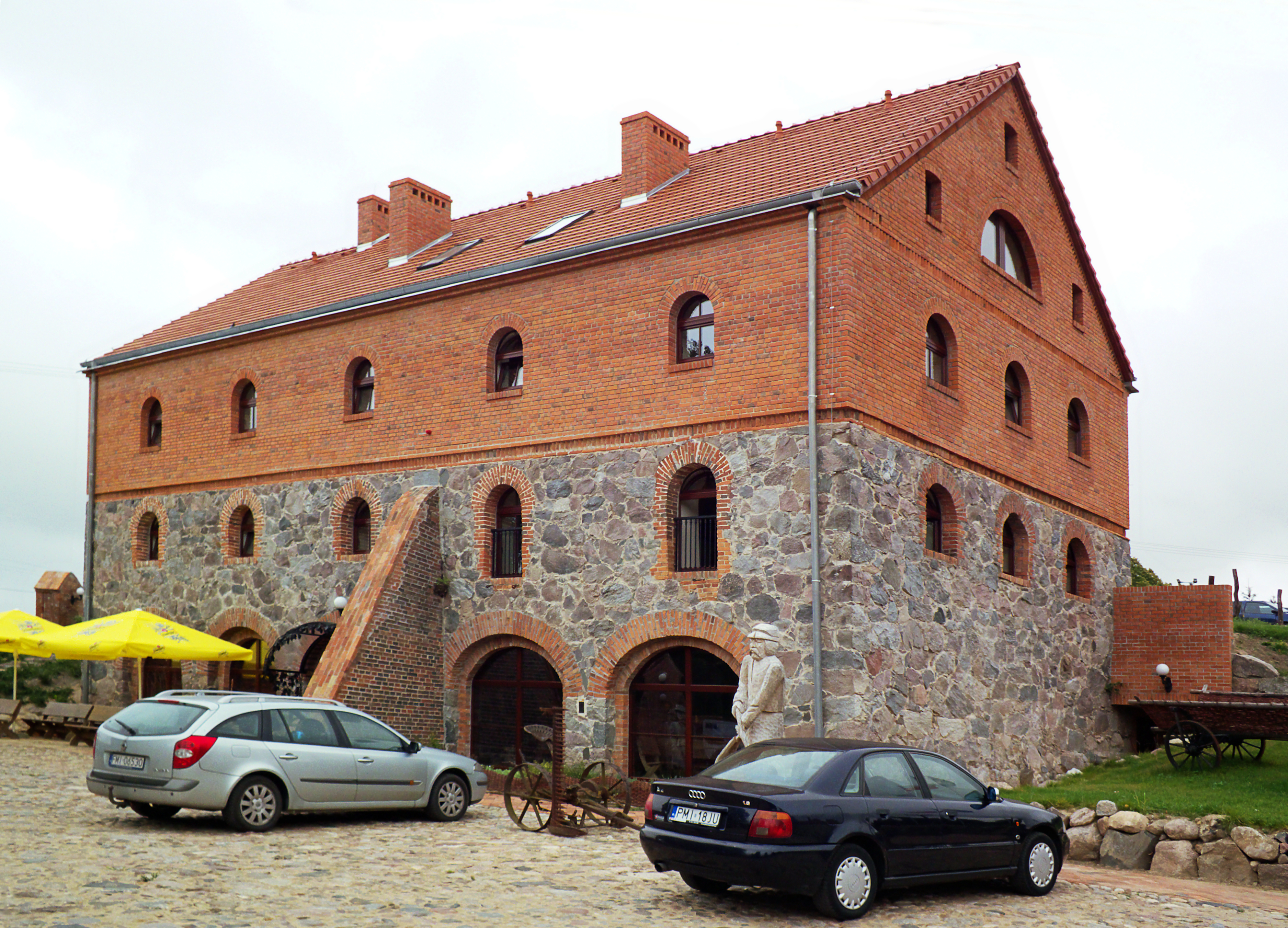 Prusim - spichlerz z 1844 r. w zespole dworsko-folwarcznym